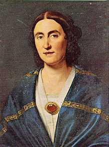 Giuseppina Strepponi (1815–1897), italienische Opernsängerin und zweite Ehefrau von Giuseppe Verdi.